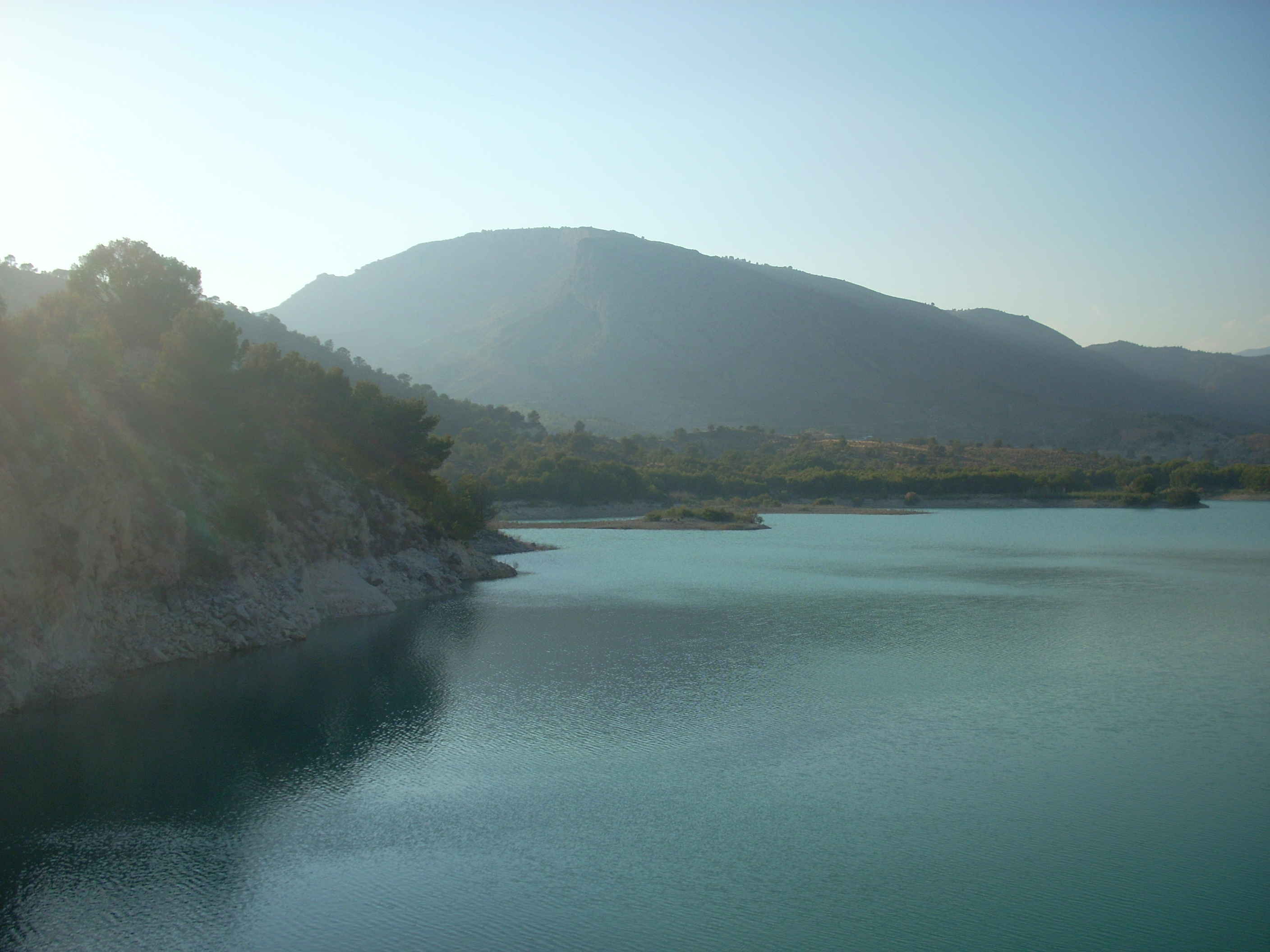 Embalse del Amadorio